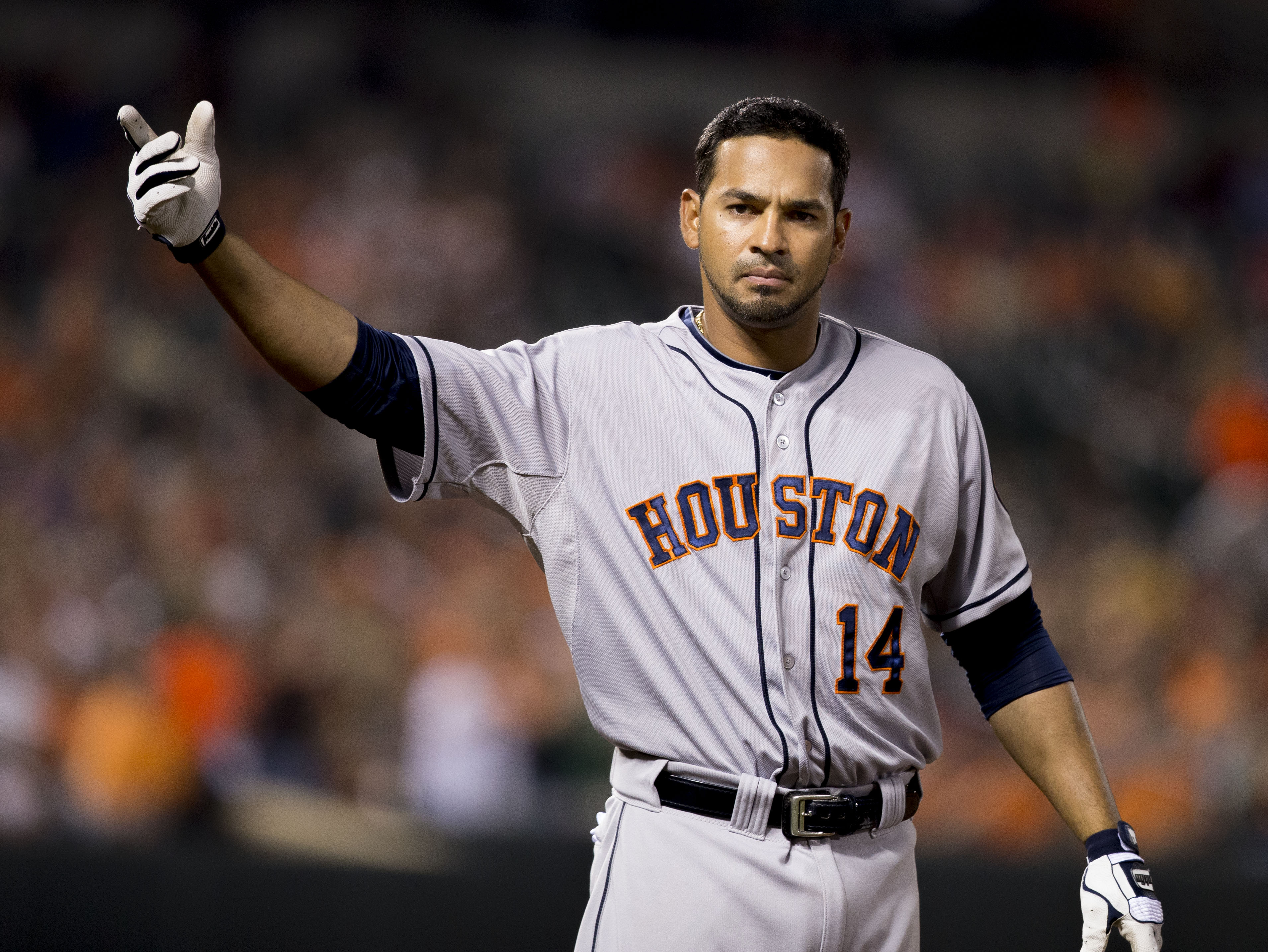 Jesús Guzmán